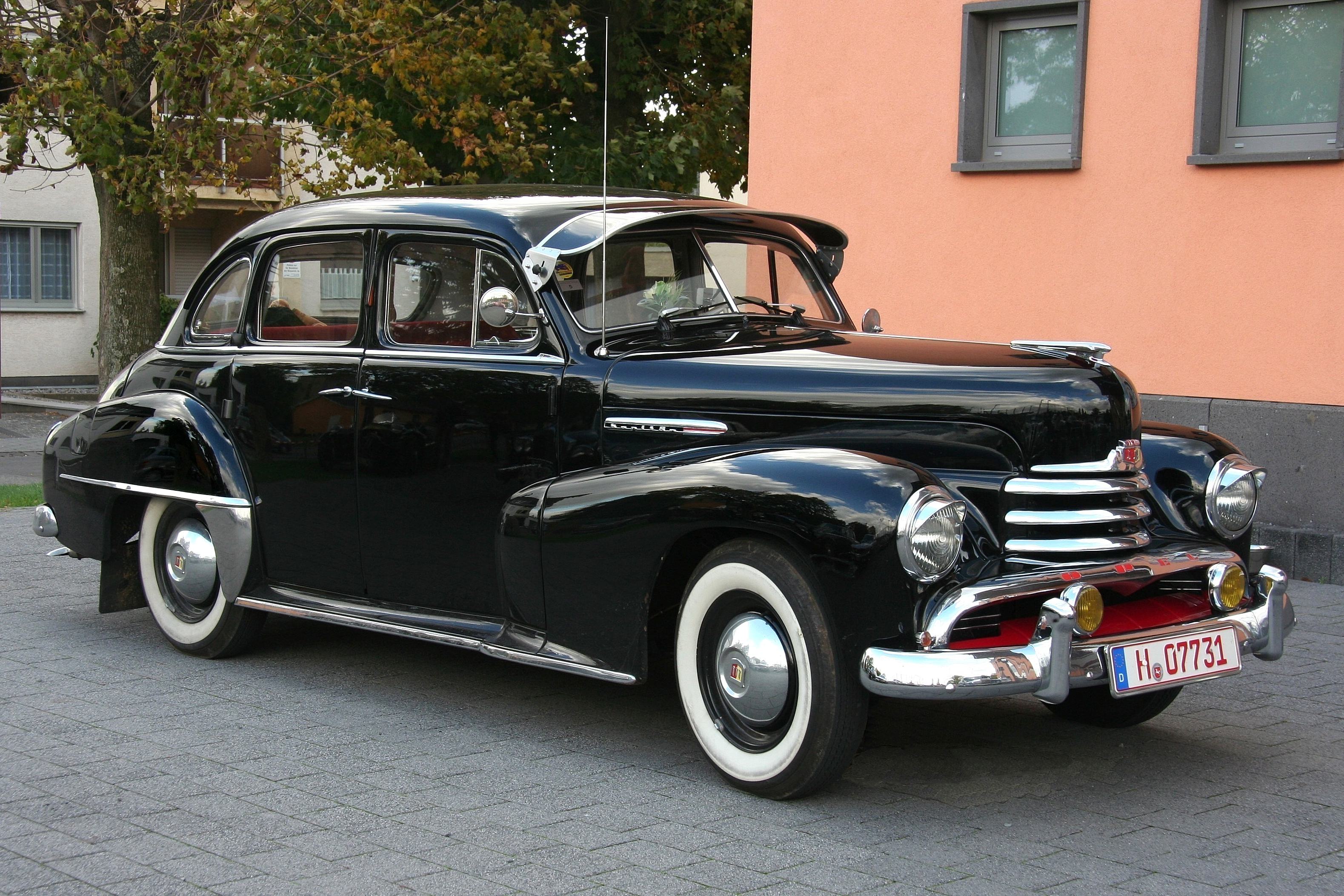 Opel Kapitän ’51 mit der damals modischen Sonnenblende über der Windschutzscheibe und Schirmen über den Scheinwerfern